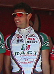 Ludovic Martin. R.A.G.T. Semences, Euskal Bizikleta 2005